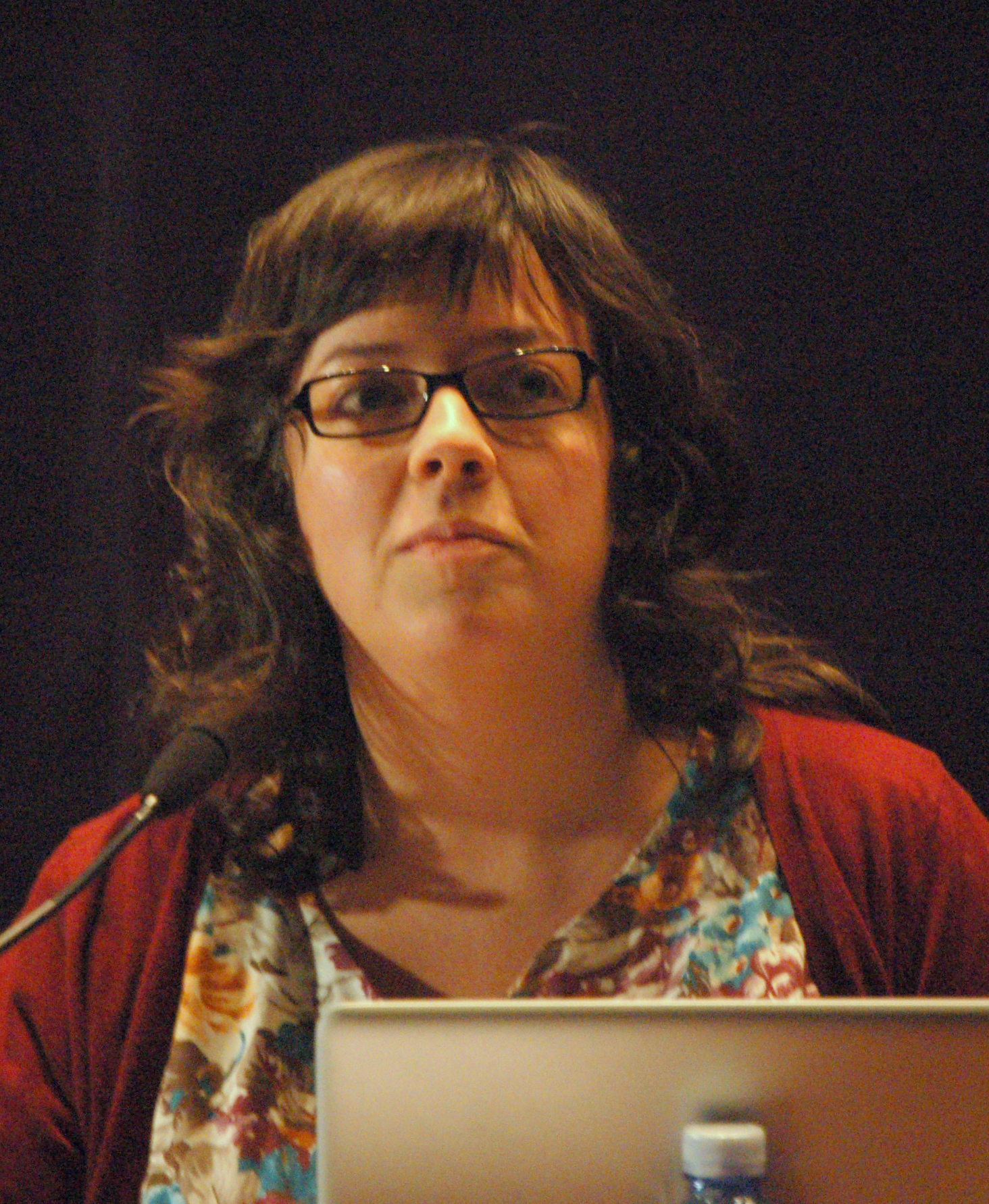 María Yáñez no I Simposio Ecolingua